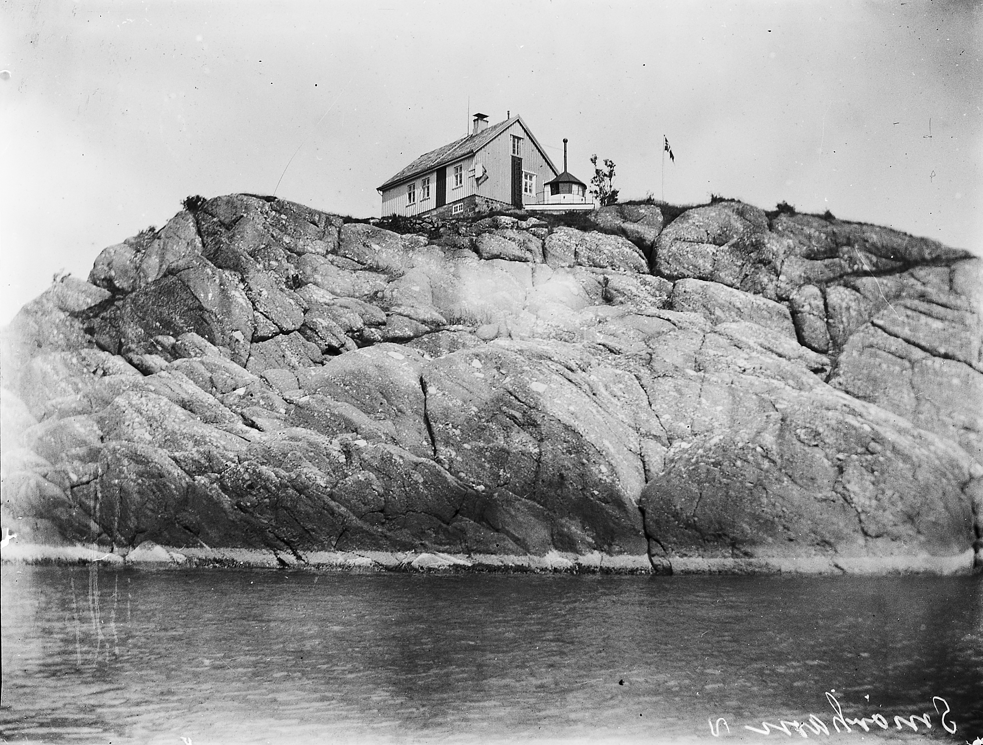 Bildet er hentet fra Arkivverket. Smørhavn, Bremanger Arkivinstitusjon : Riksarkivet Arkivnavn : Fyrdirektoratet Sted : Norge, Sogn og Fjordane, Bremanger, Smørhavn Emneord: Fyr, Kyst Avbildet